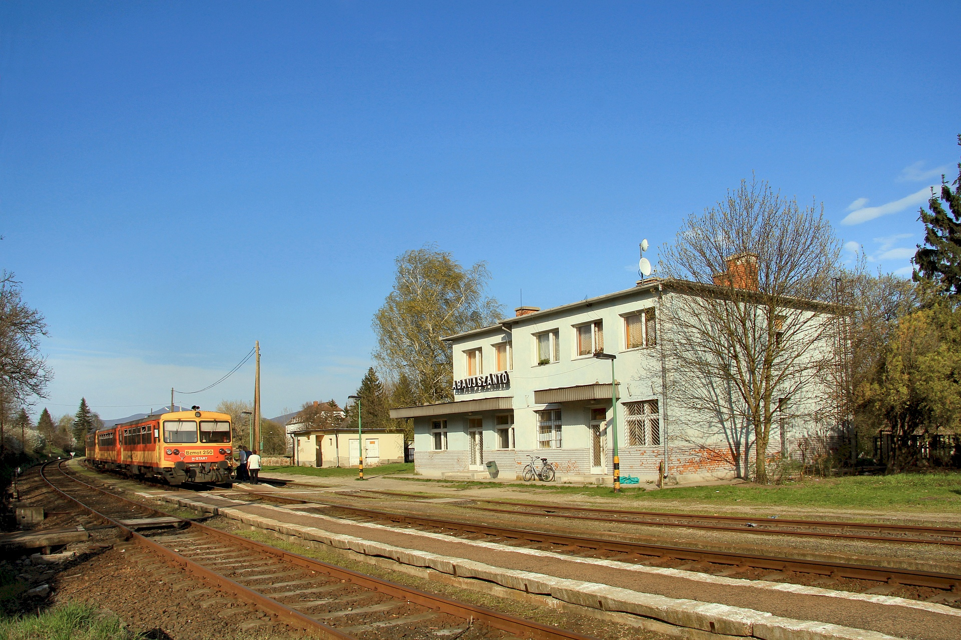 Abaújszántó vasútállomása